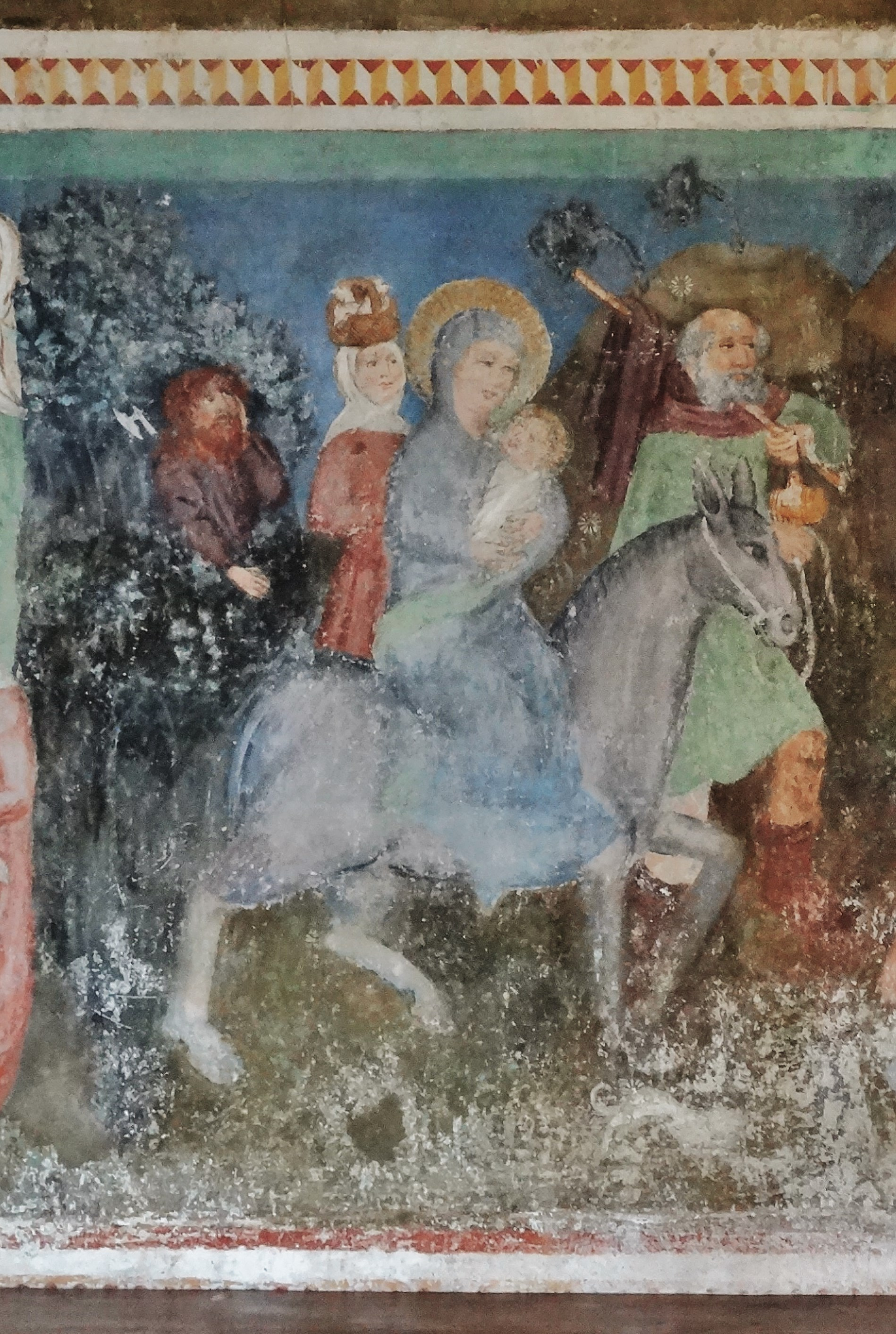 Kath. Pfarrkirche hl. Gandolf (Glanegg), Teilansicht der Fresken: die Flucht der hl. Familie